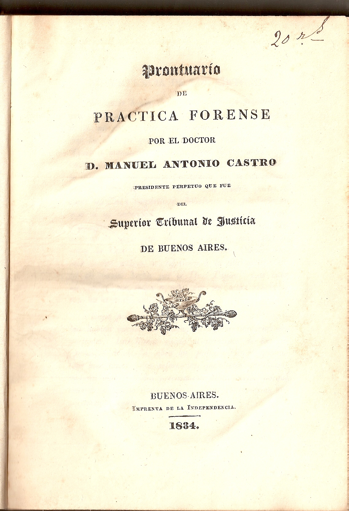 Tapa del prontuario de practica forense, Manuel A. Castro, 1834